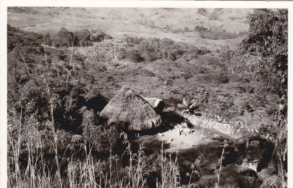 Uma grande habitação timor.Uma só entrada,vários andares no interior.Própria das regiões altas e ventosas.